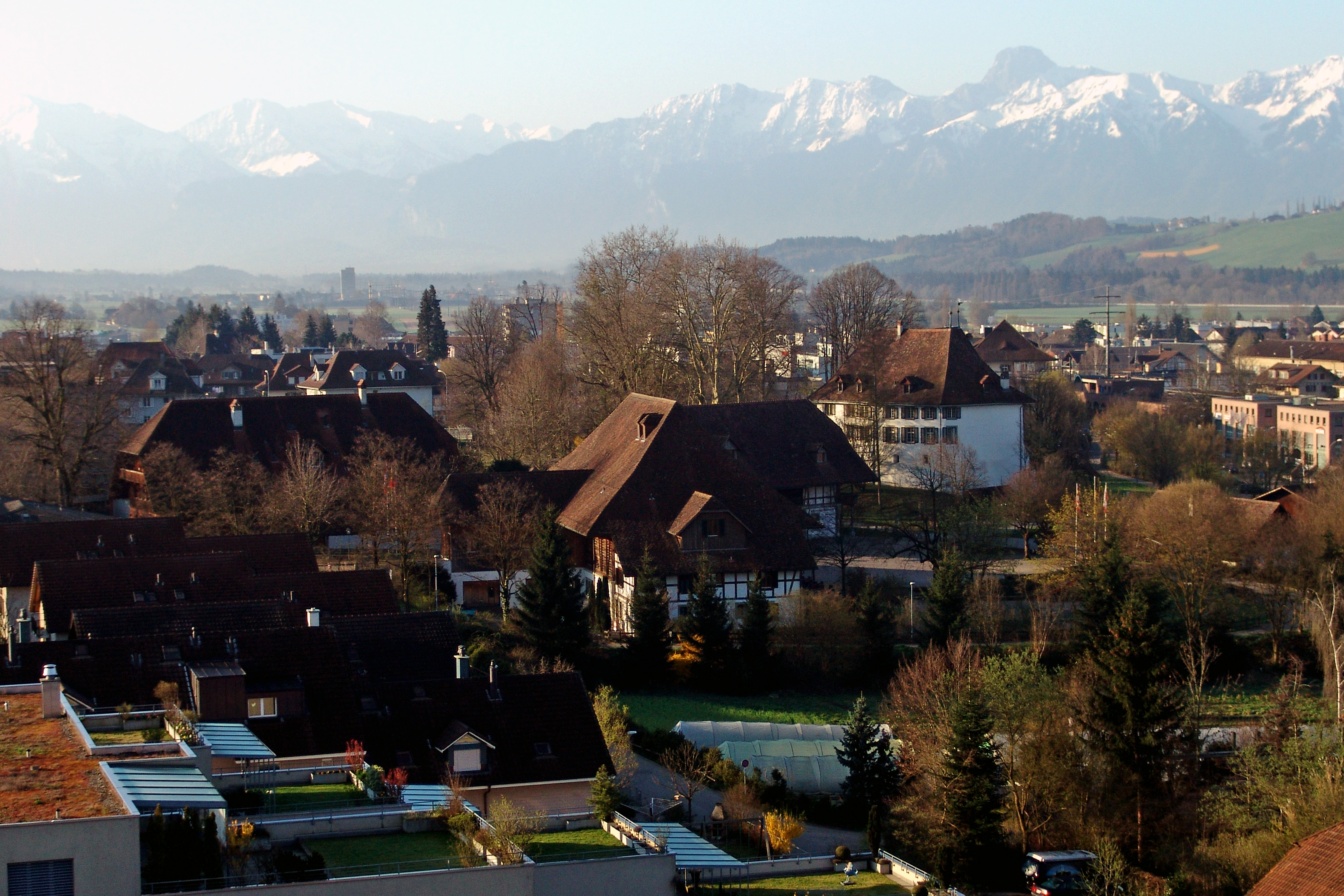 Die landwirtschaftlichen Gebäude des sog. Schlossgutes in einer Übersicht vom Kirchturm aus.